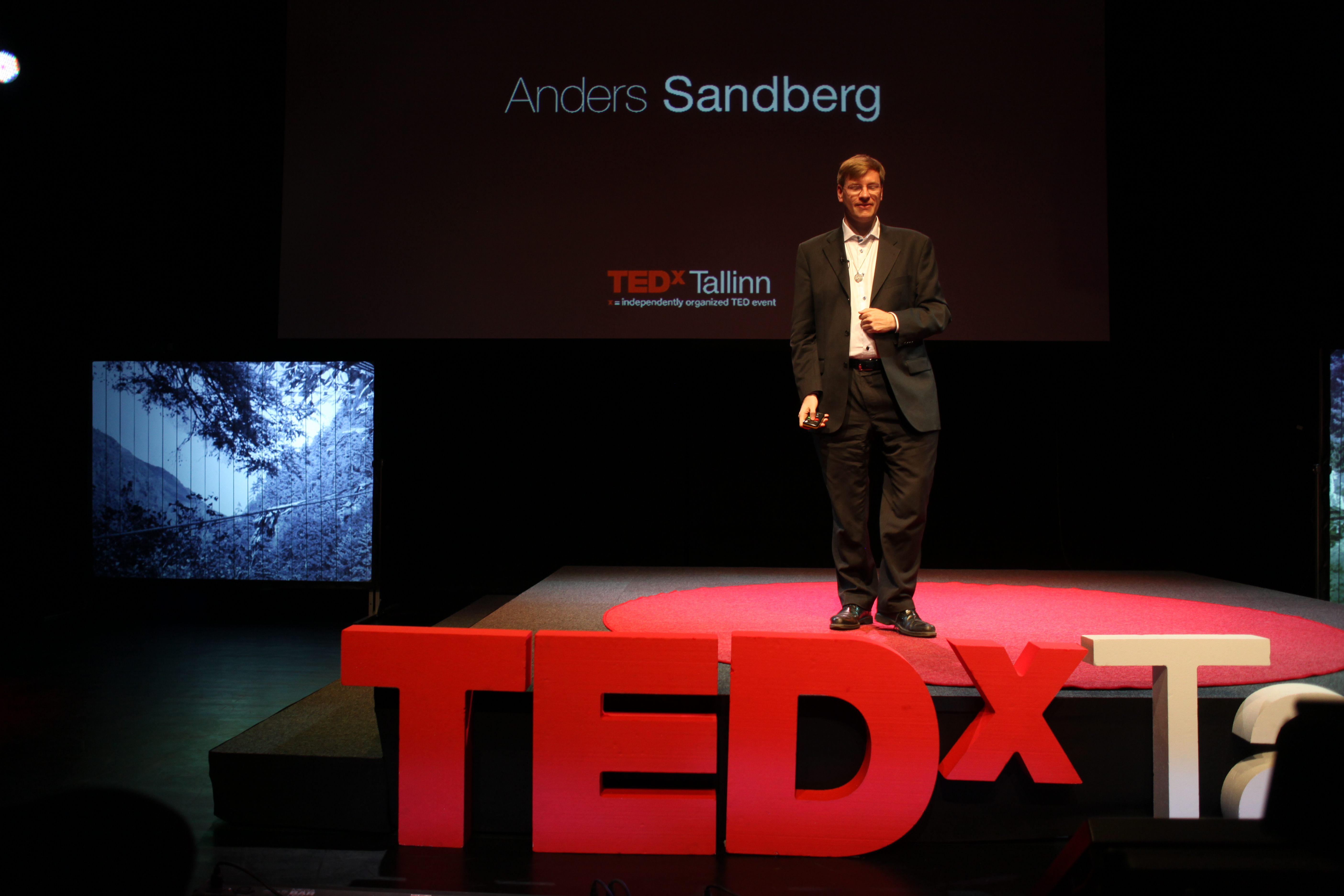 Anders Sandberg esinemas TEDxTallinn konverentsil 2012. aastal.